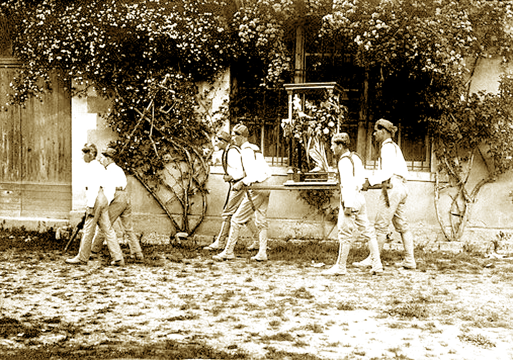 Monteux portage de Saint-Gens vers le Beaucet